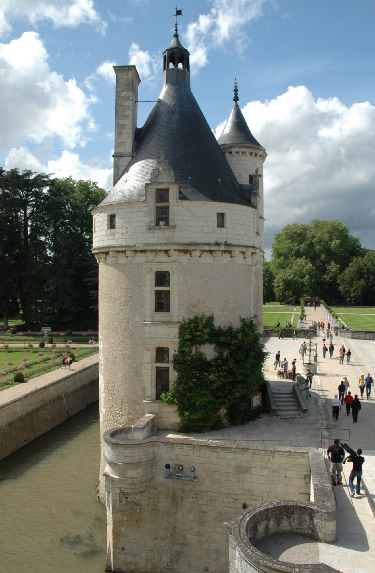 Der Tour des Marques des Schlosses Chenonceau